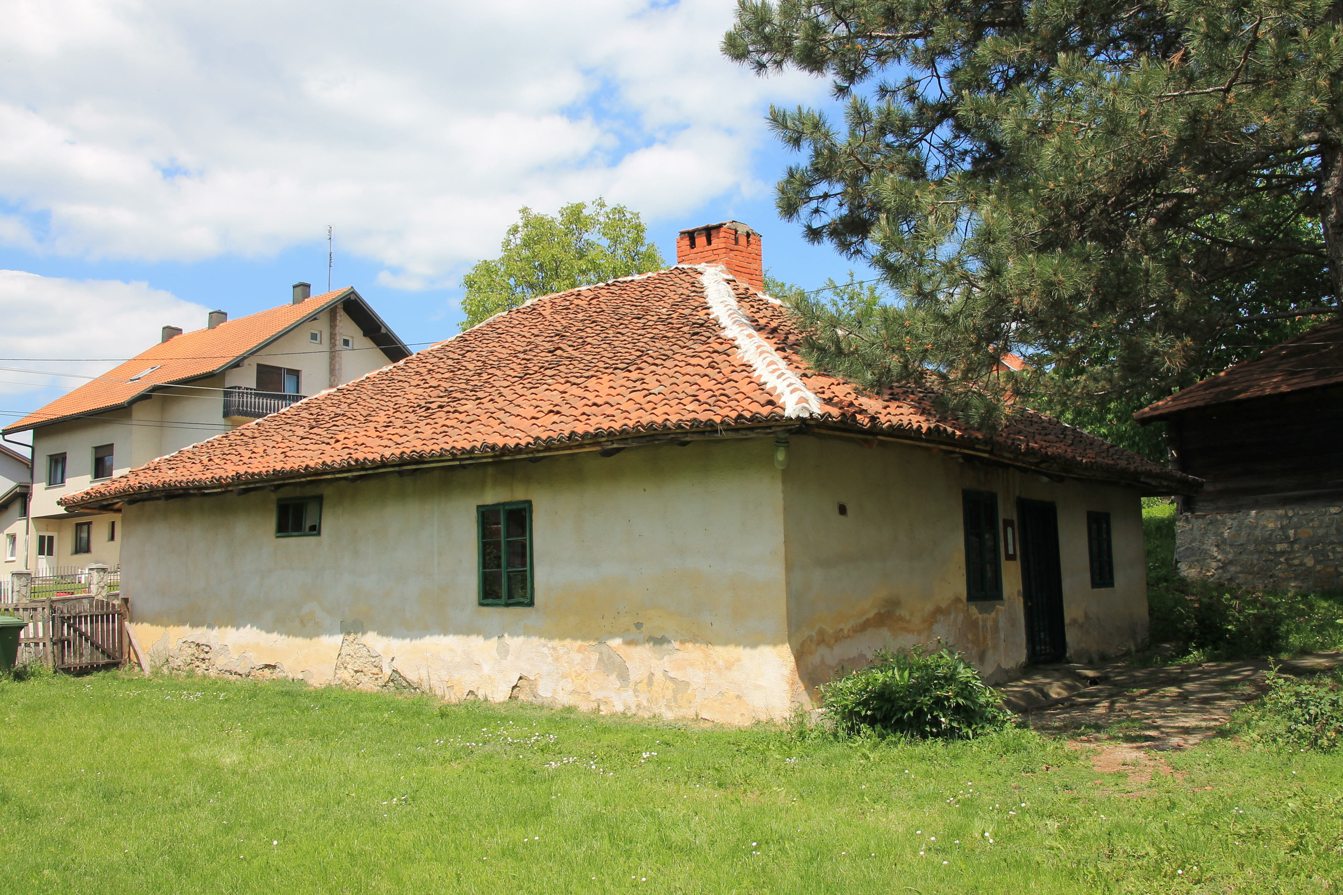 Okućnica Ilije Miloševića